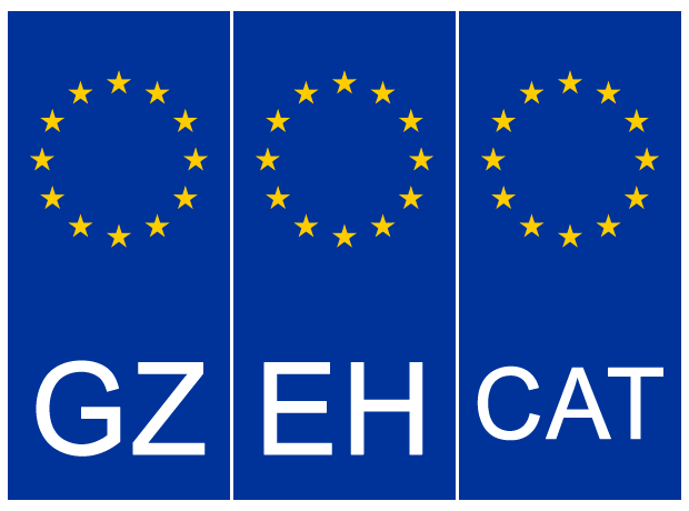 Pegatinas para placas de Galiza, Euskadi e Cataluña.